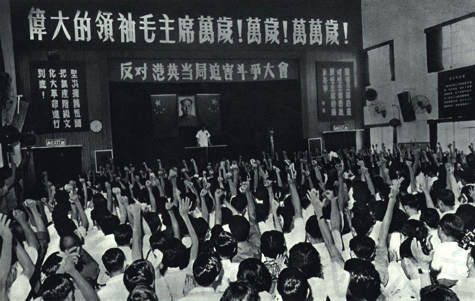 1967-08 1967年 香港电车工人罢工